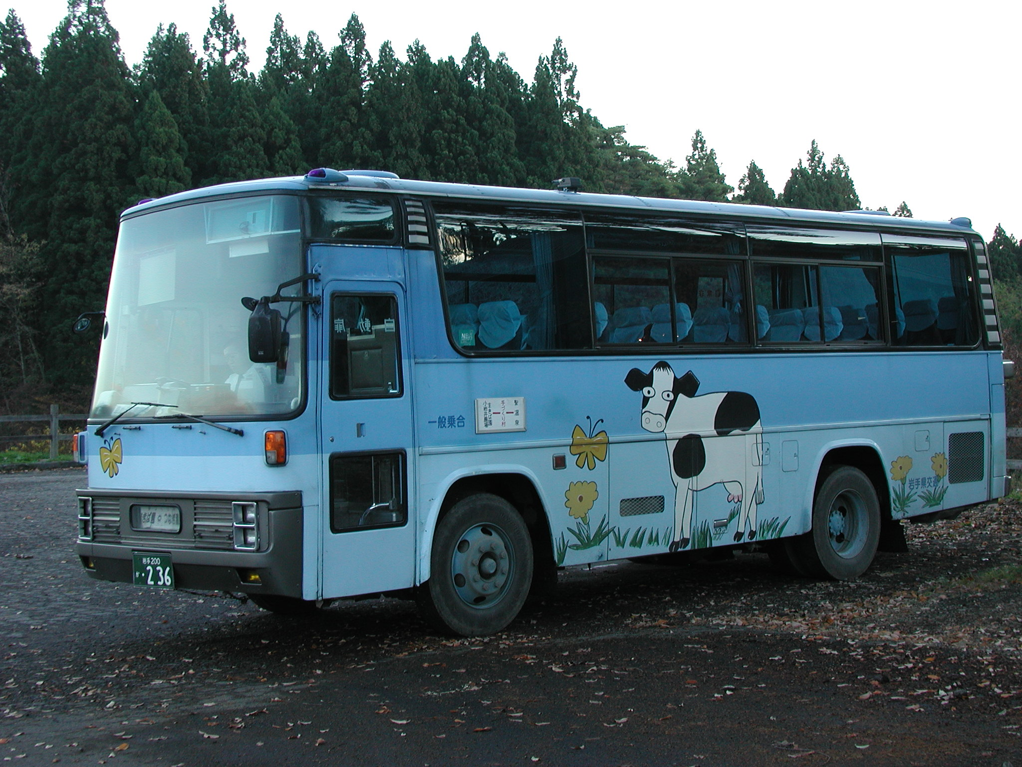 岩手県交通小岩井巡回線（小岩井農場 場内案内バス）専用車両（いすゞP-LV217H） 小岩井農場駐車場内にて ※：この車両は他に繋・小岩井線（つなぎ温泉～小岩井農場間）の1往復の運用にも使われている。